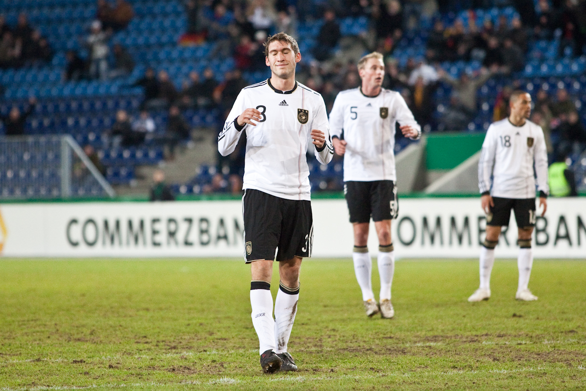 Stefan Reinartz im U-21-Länderspiel Deutschland gegen Island.